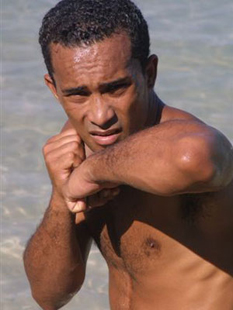 Marc Apelé en garde de sanglier (bando)